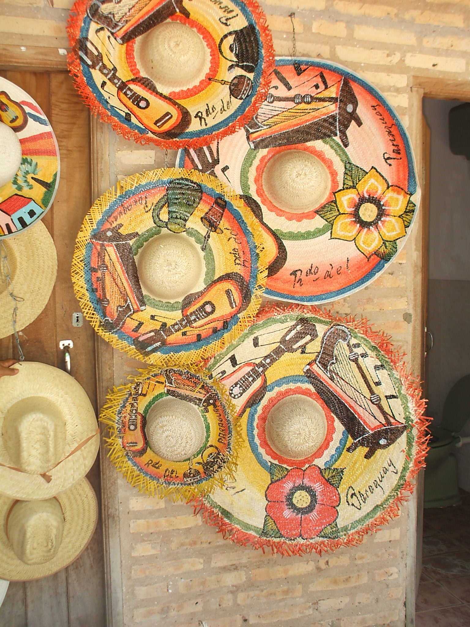 Artesania de Atyra